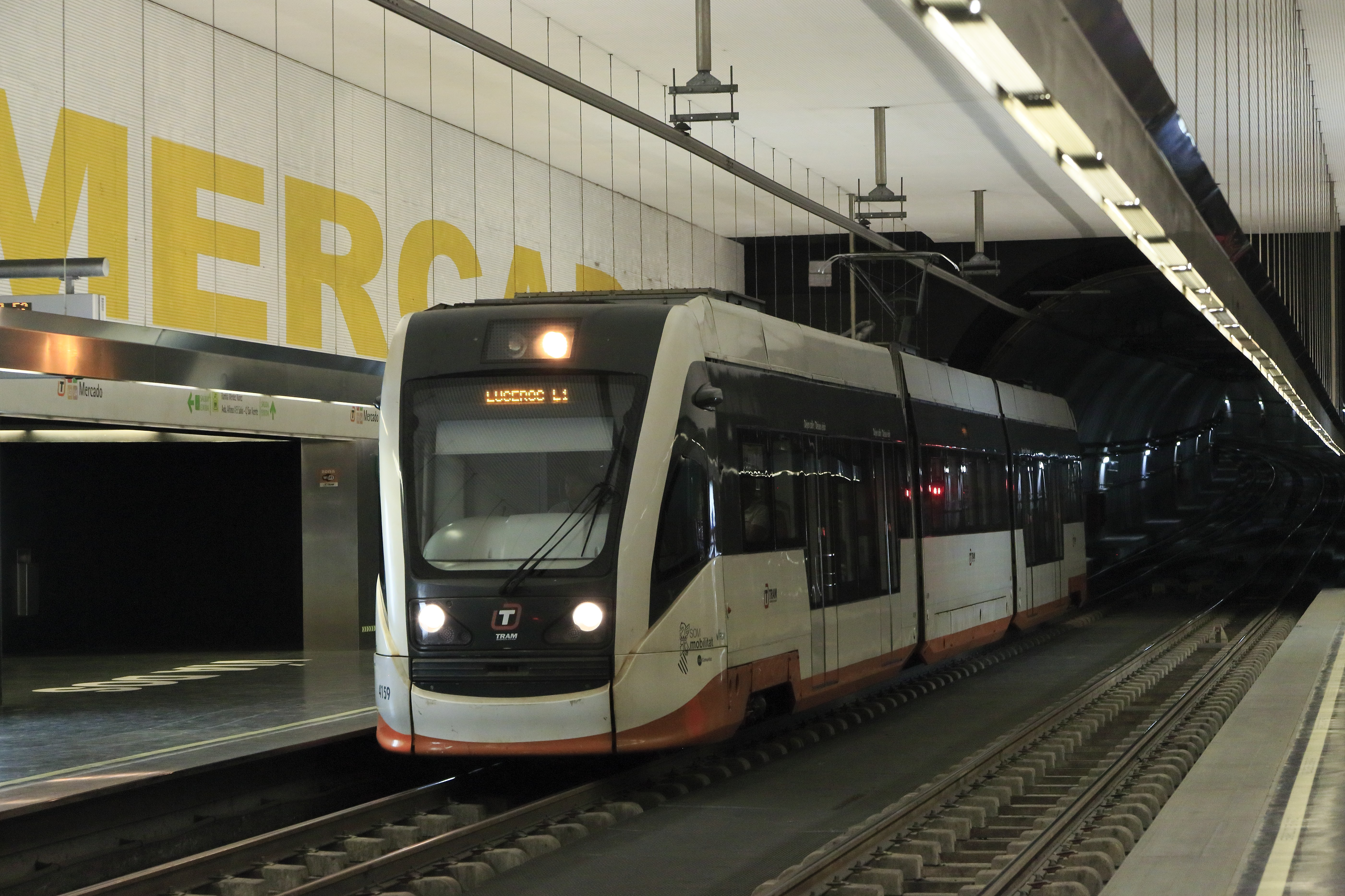 Bahnsteighalle Richtung MARQ-Castillo, ein Zug der Linie 1 von Benidorm nach Luceros kurz vor dem planmäßigen Halteplatz